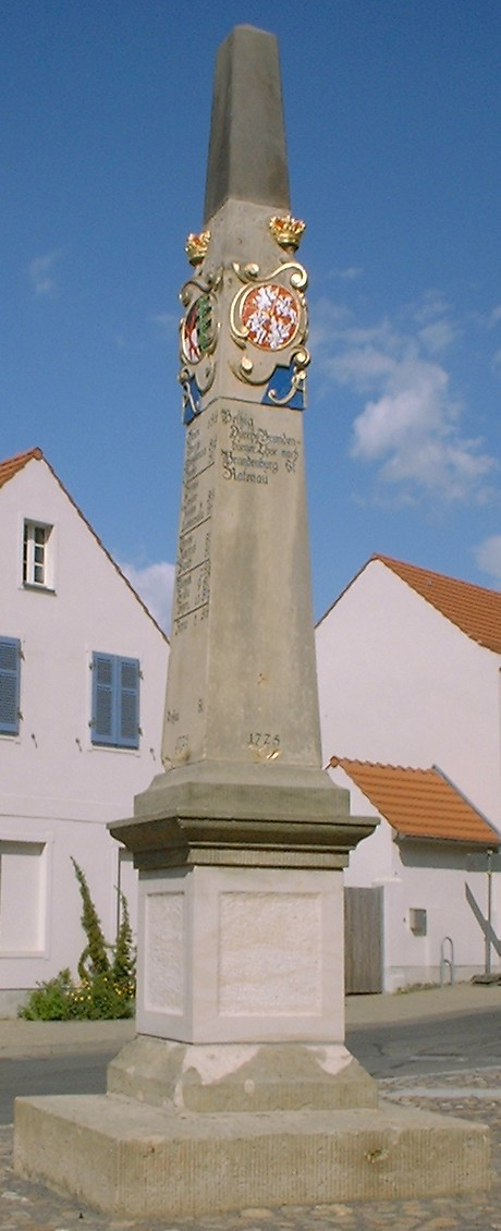 Postmeilensäule in Belzig, Deutschland (1725, vor Bahnhofsstr. 16)